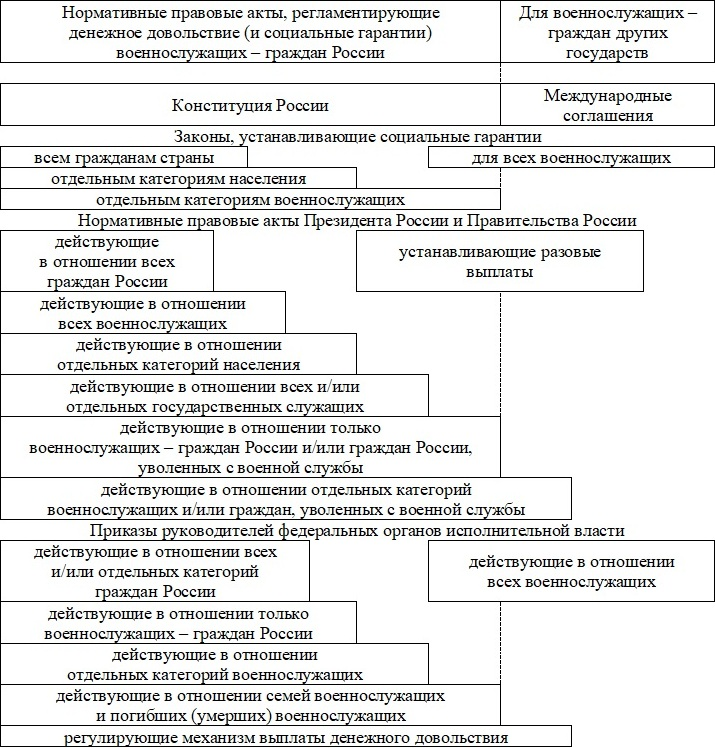 Схема нормативно-правового регулирования